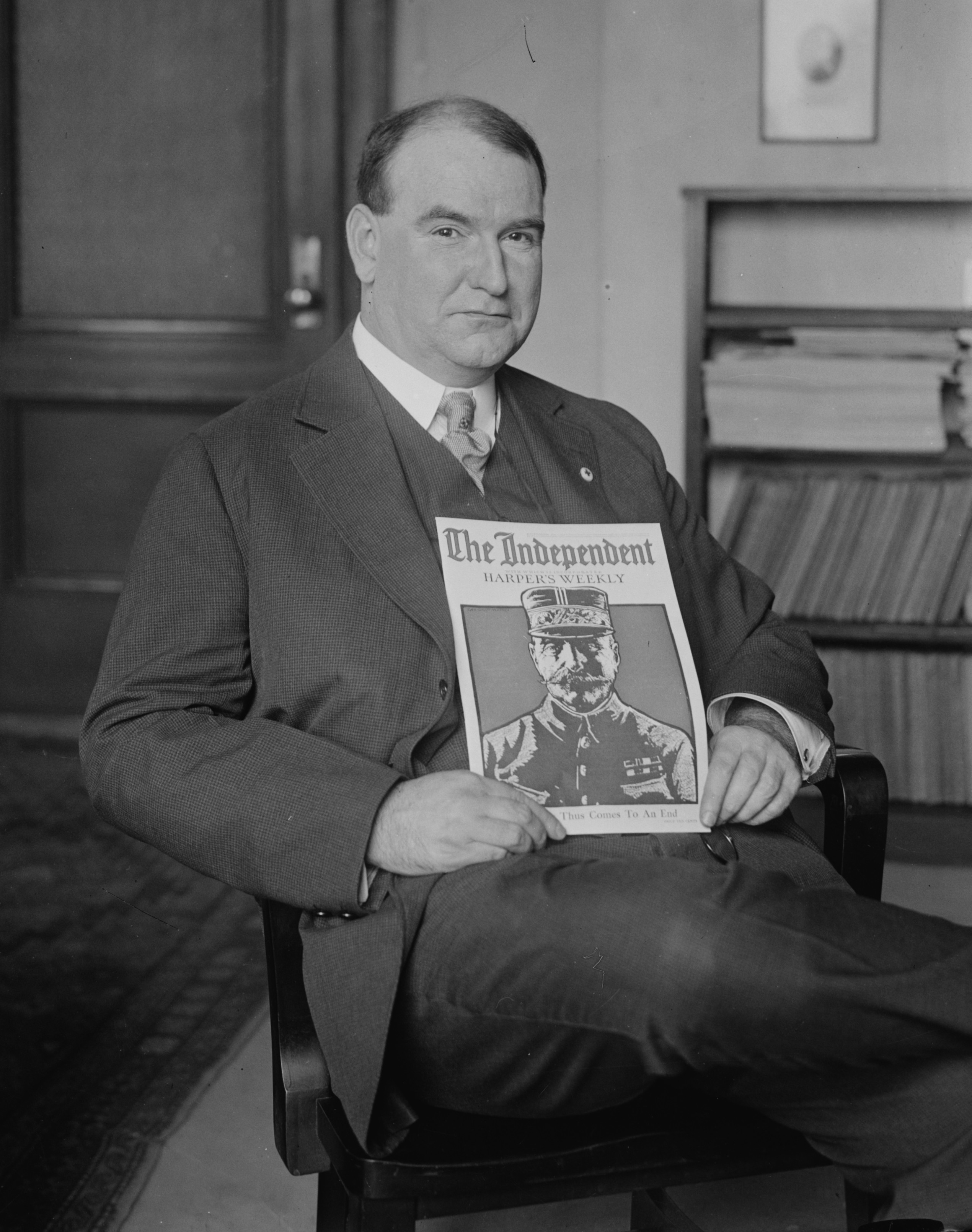 Hamilton Holt